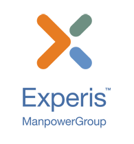 LOGOTYP